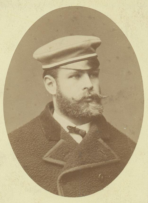 Porträtfotografie von Georg Juffinger (1853–1913)